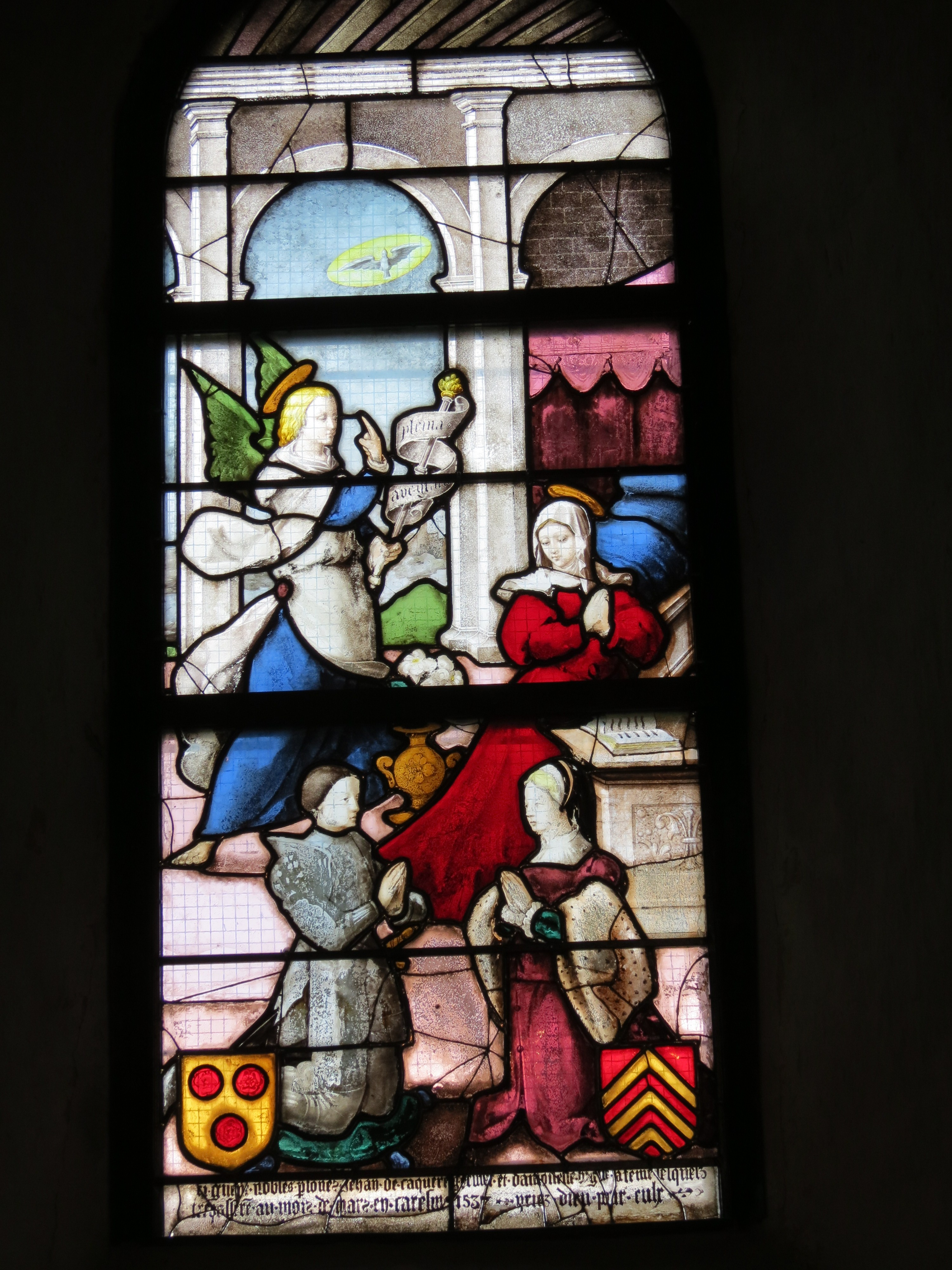 Église Saint-Martin de Bézu-la-Forêt.